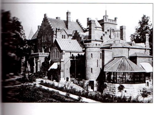 Sangastes pils ap 1905.gadu.